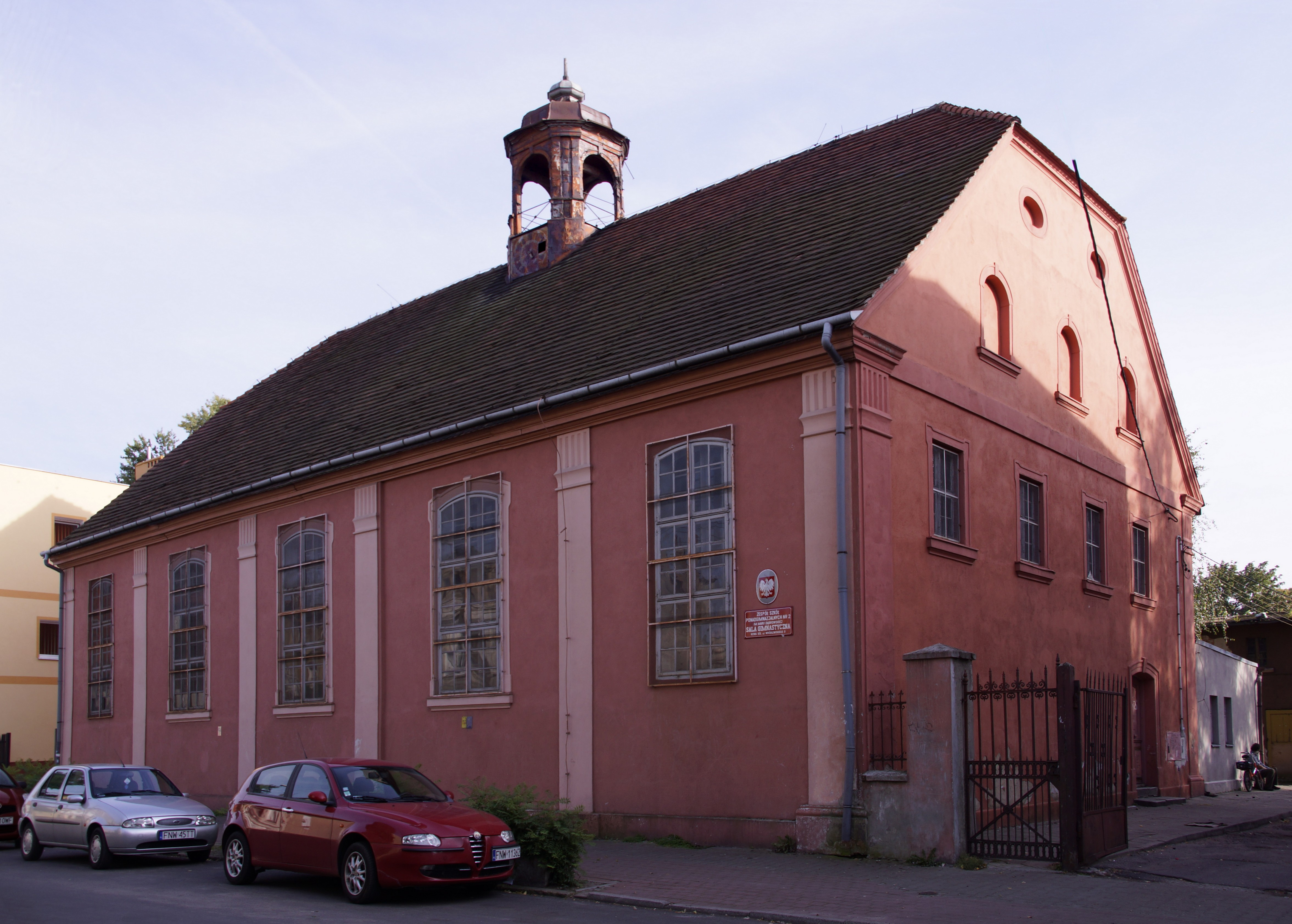 Świątynia braci morawskich, ob. szkoła, mur., 1747 Nowa Sól, ul. Wróblewskiego 6 02.1993.